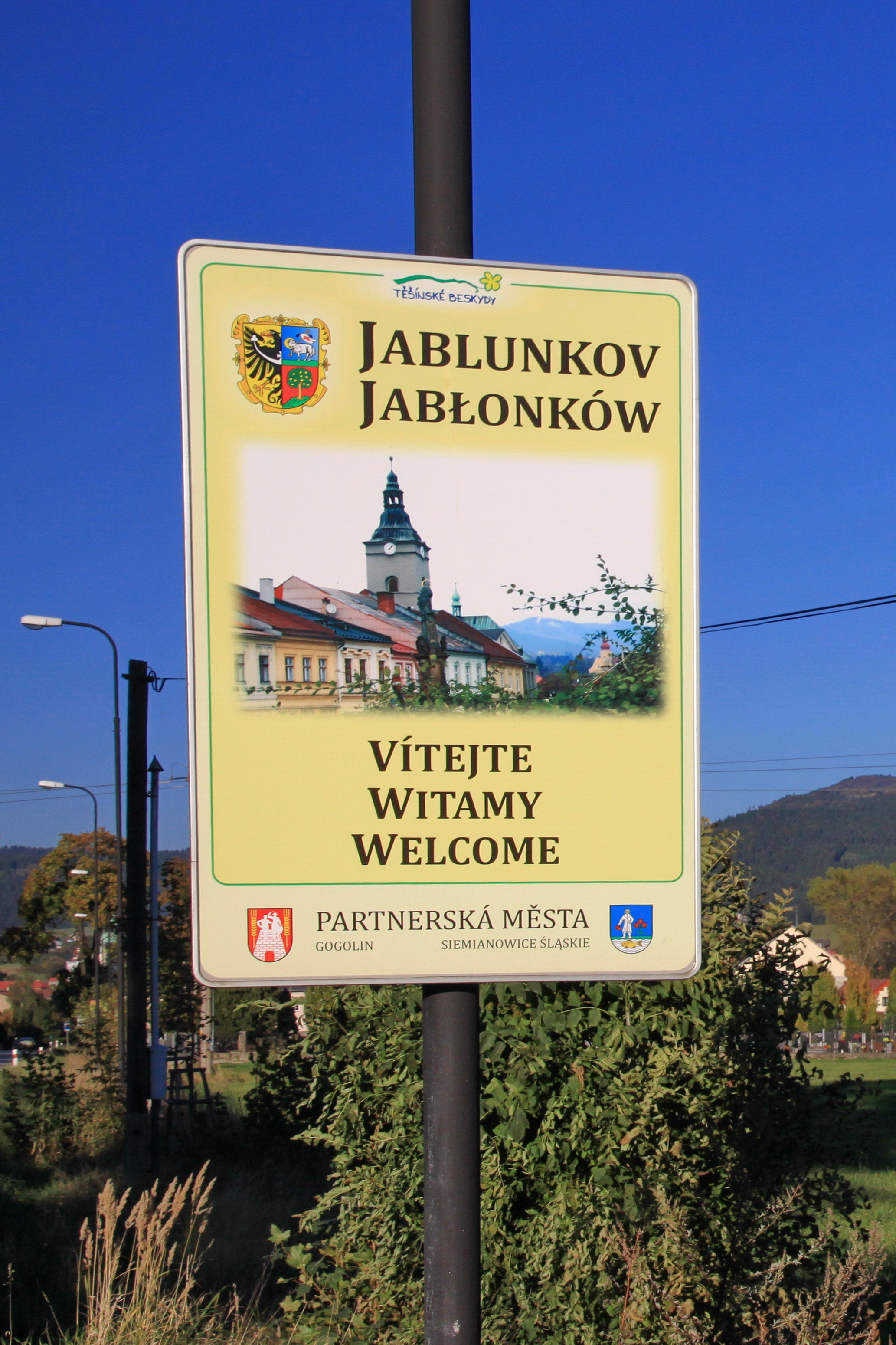 Tablica miasta Jabłonków przy drodze nr 474